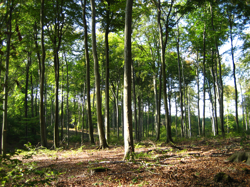 beech forest; Dübener Heide, Germany